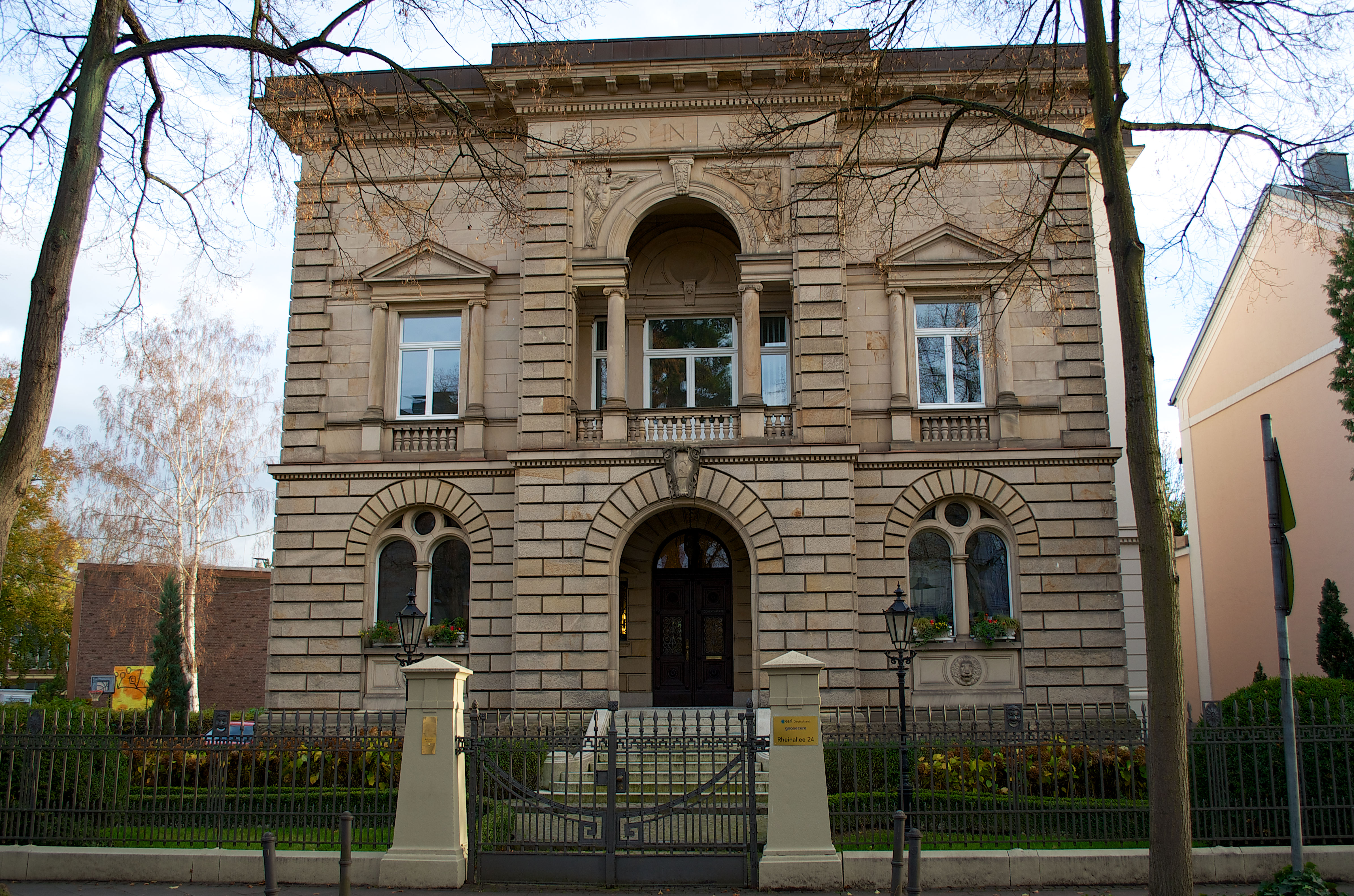 Denkmalgeschützte Villa Rheinallee 24 in Bad Godesberg, Ortsteil Godesberg-Villenviertel